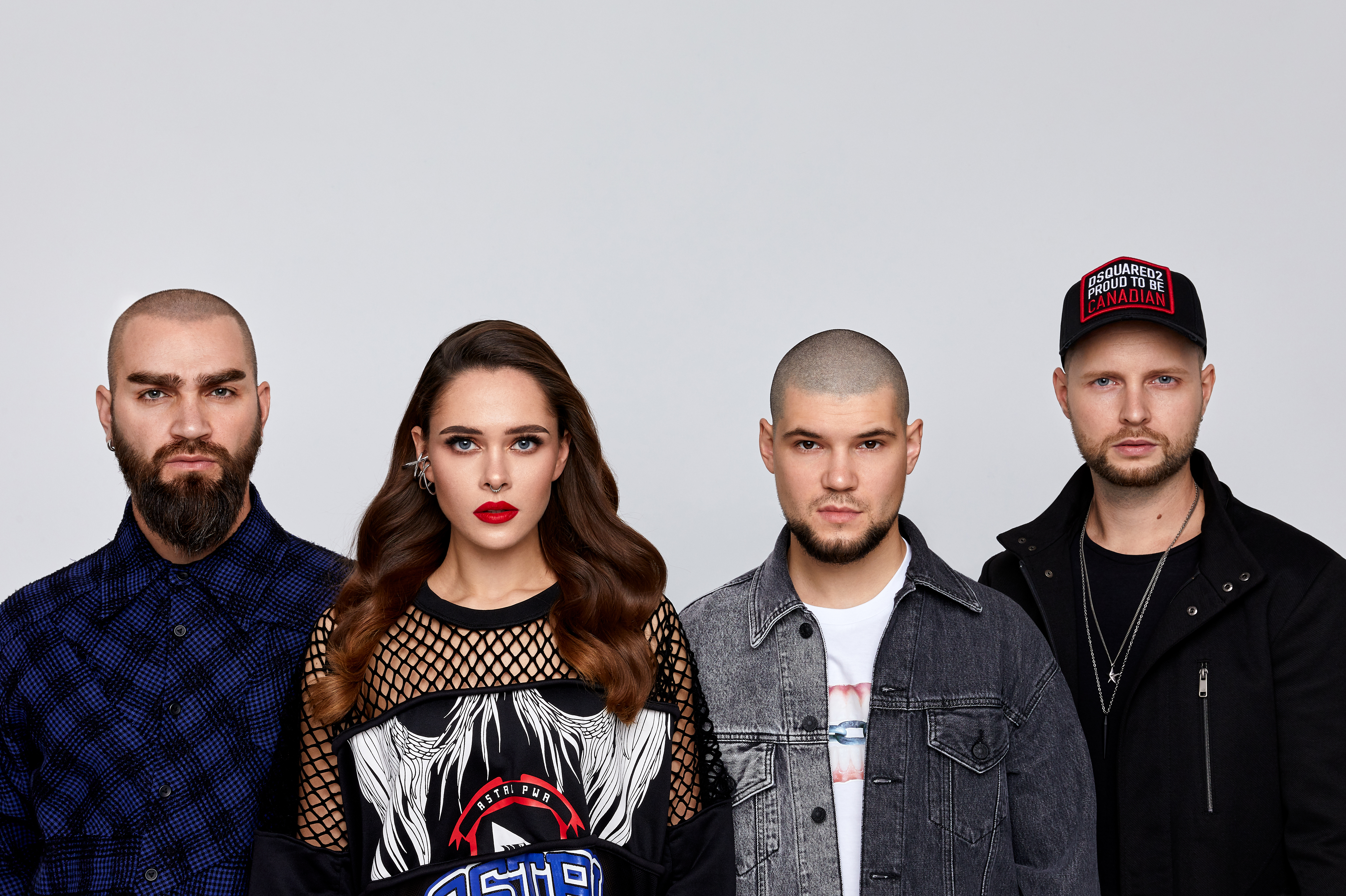 Новий склад The HARDKISS